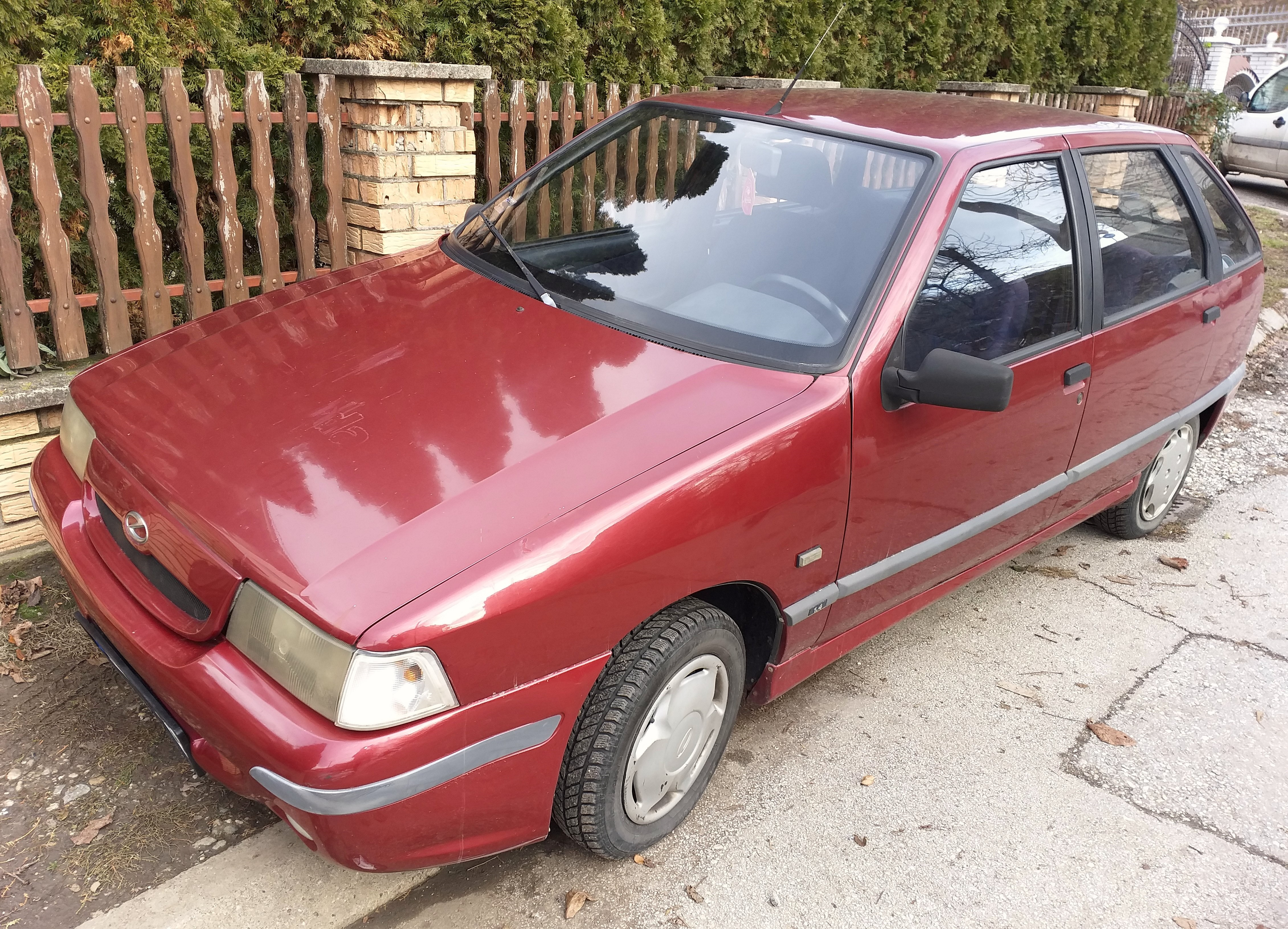 Srpski (latinica): Застава Флорида Ин Л са 1.4 ПСА дизел мотором са 68 КС.